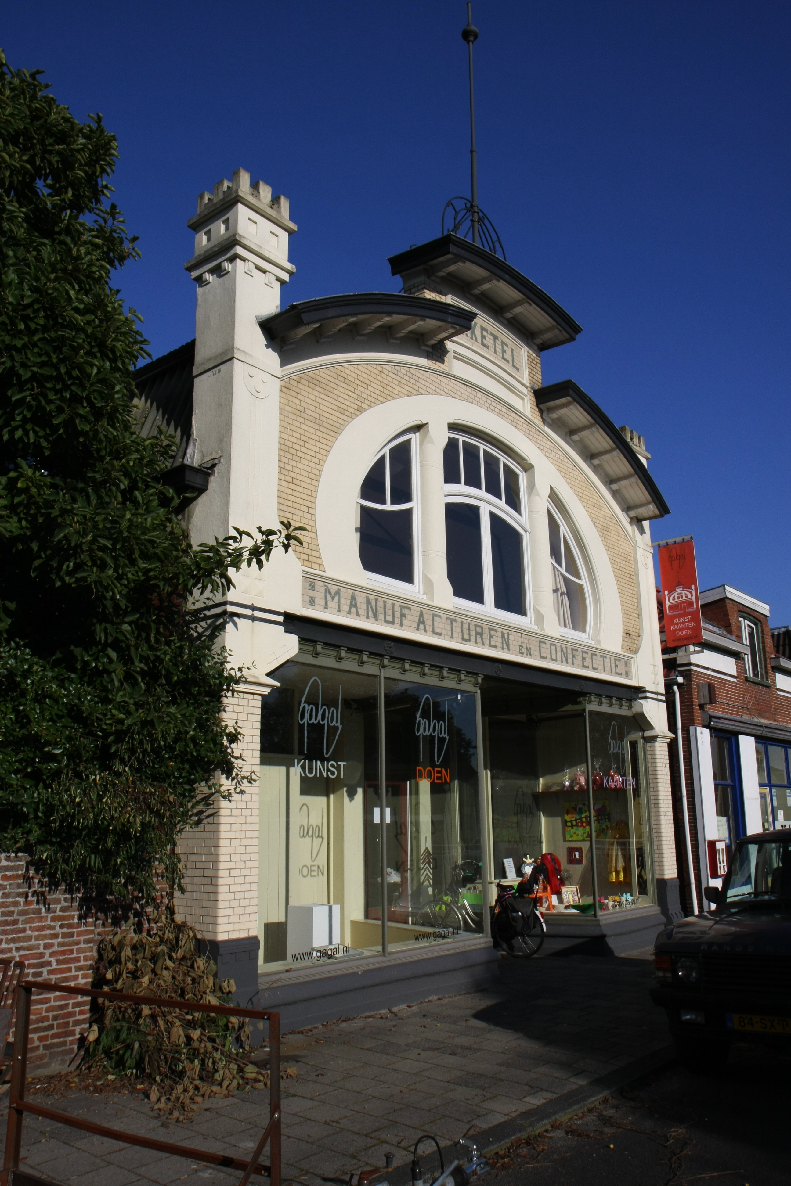 Winkelwoning te Wildervank, Nijverheidsstraat 73